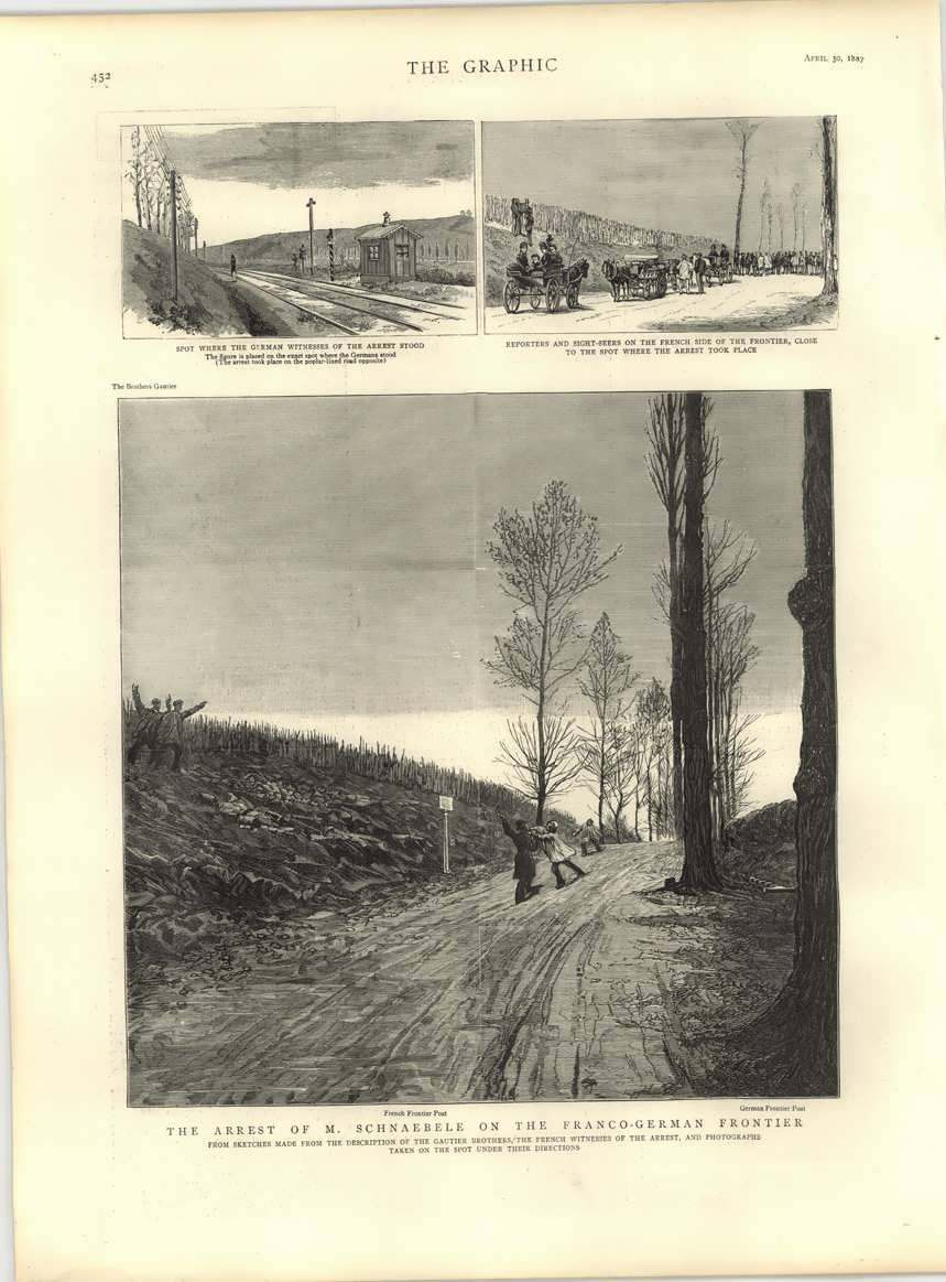 Arrest Schnaebele Franco-German Frontier Gautier 159N742